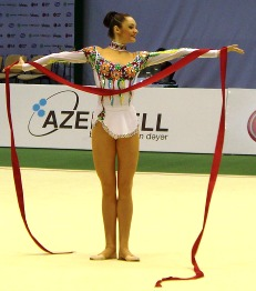 Анна Бессонова (Украина) ЧЕ в Баку 2009